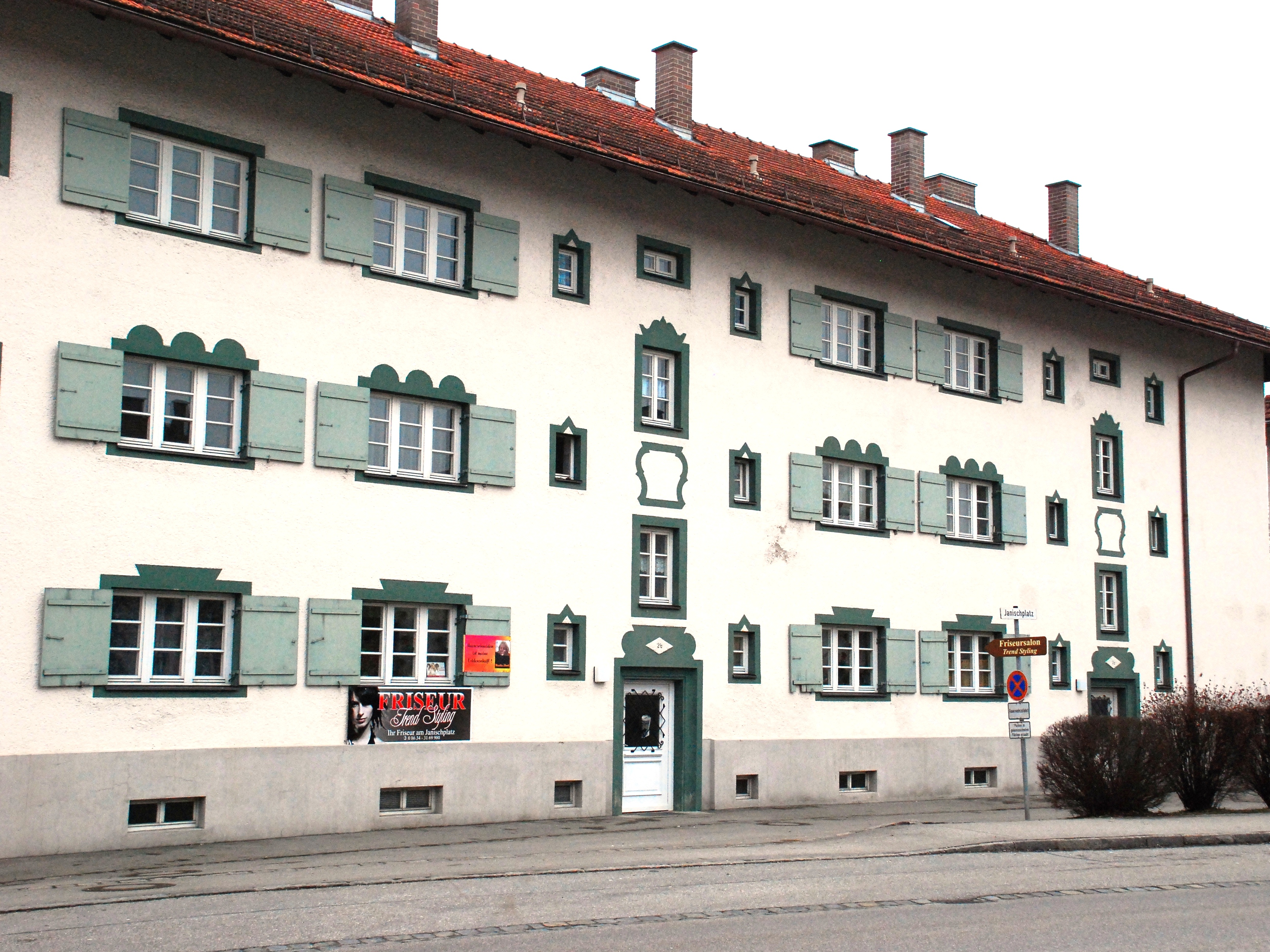 Wohnhaus Janischplatz 2b in Garching an der Alz, Landkreis Altötting, Regierungsbezirk Oberbayern, Teil der Janisch-Siedlung (ehemalige SKW-Werkssiedlung), errichtet durch von Otto Rudolf Salvisberg um 1924. Als Baudenkmal unter Aktennummer D-1-71-117-21 in der Bayerischen Denkmalliste aufgeführt.